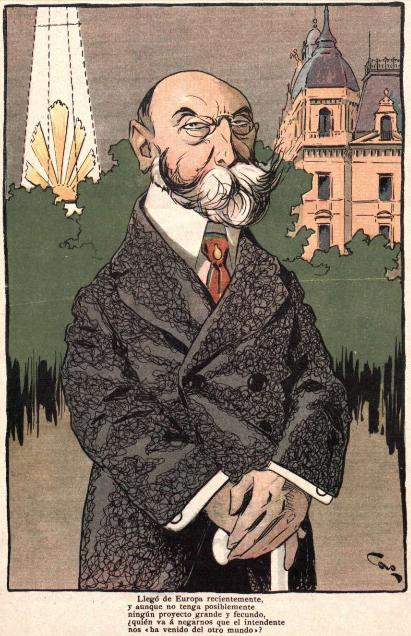 Intendente de Buenos Aires Carlos Rosetti, caricaturizado por Cao.